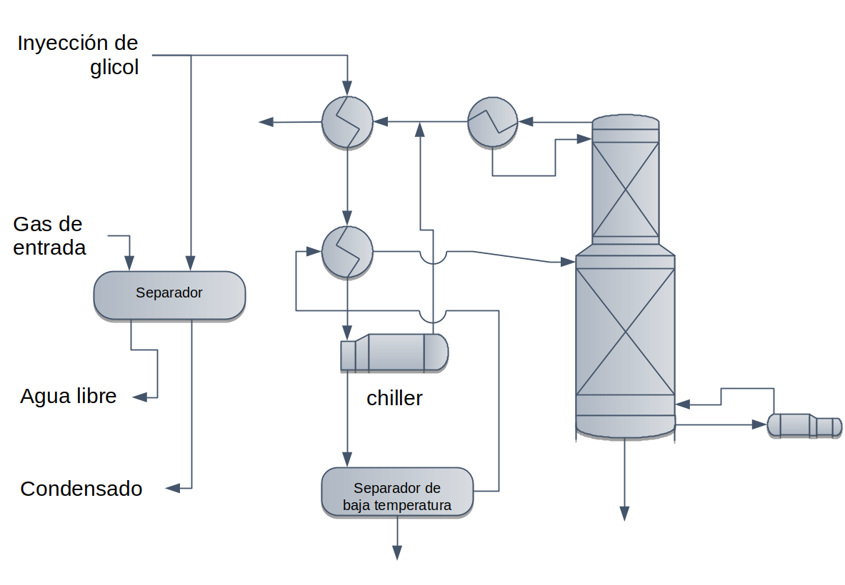 Figura 79. Diagrama del procesamiento del Gas por Refrigeración.